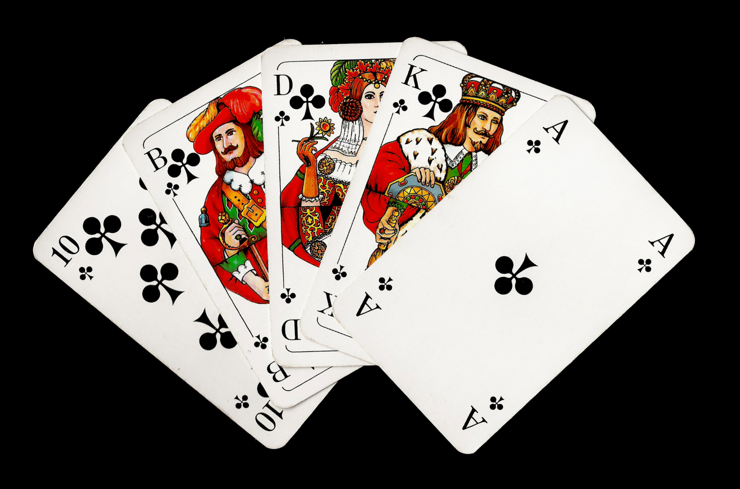 Straight Flush beim Poker